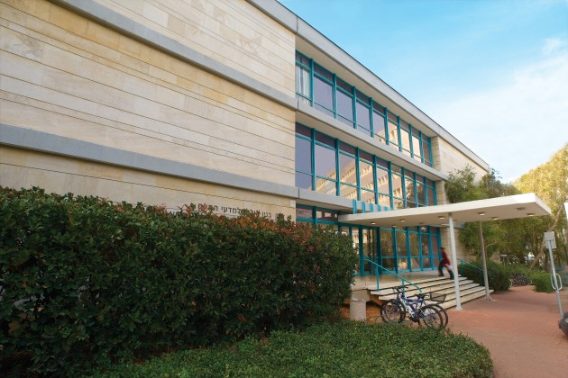 בניין אולמן